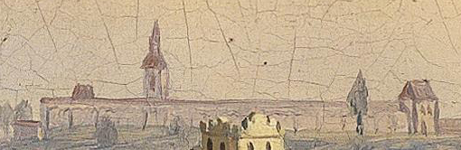 Der Steyrer Taborfriedhof aus einer Stadtansicht von Mitte des 19. Jahrhunderts.